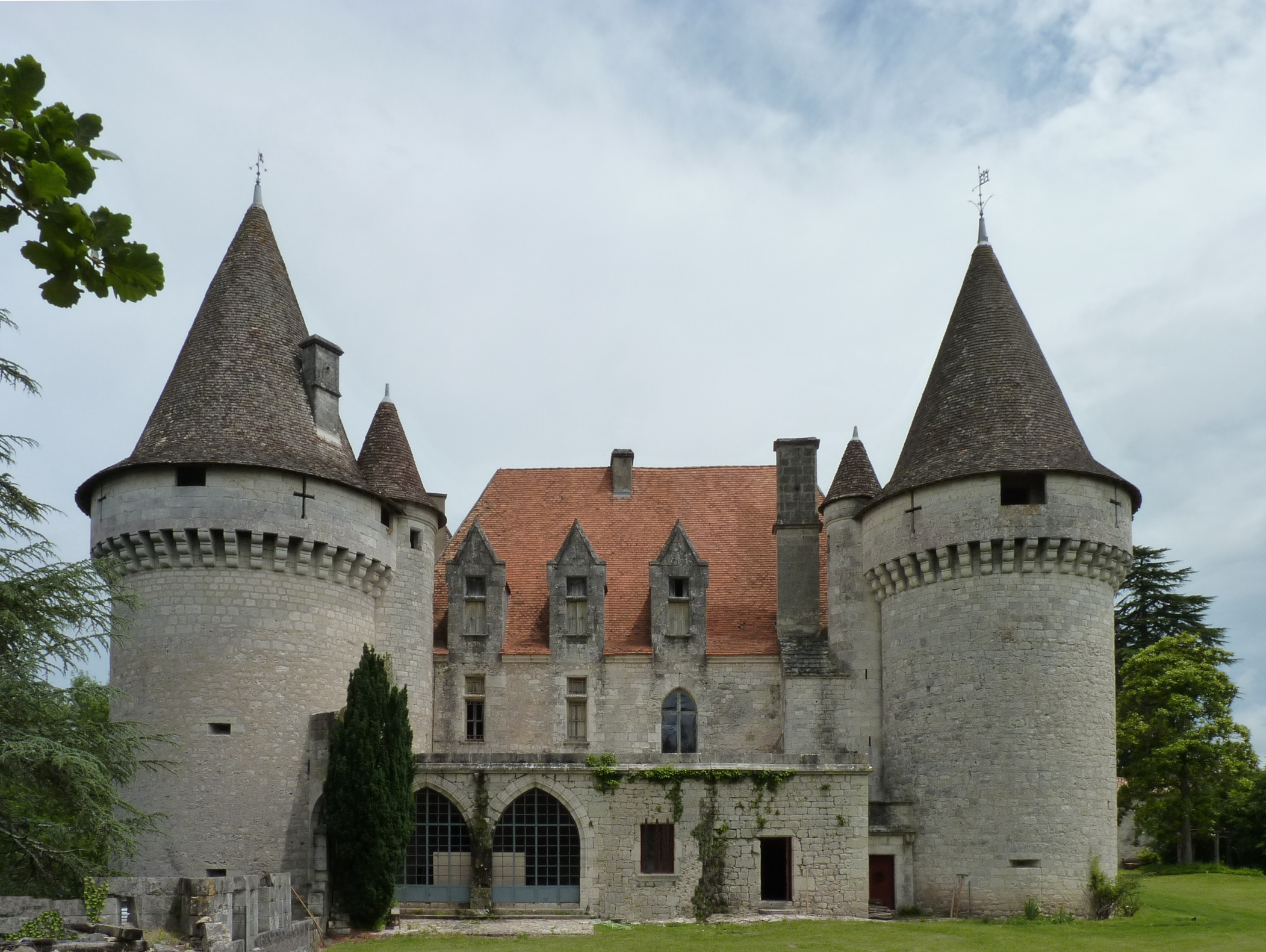 Domaine du château de Bridoire, village de Ribagnac, département de la Dordogne - Façade ouest